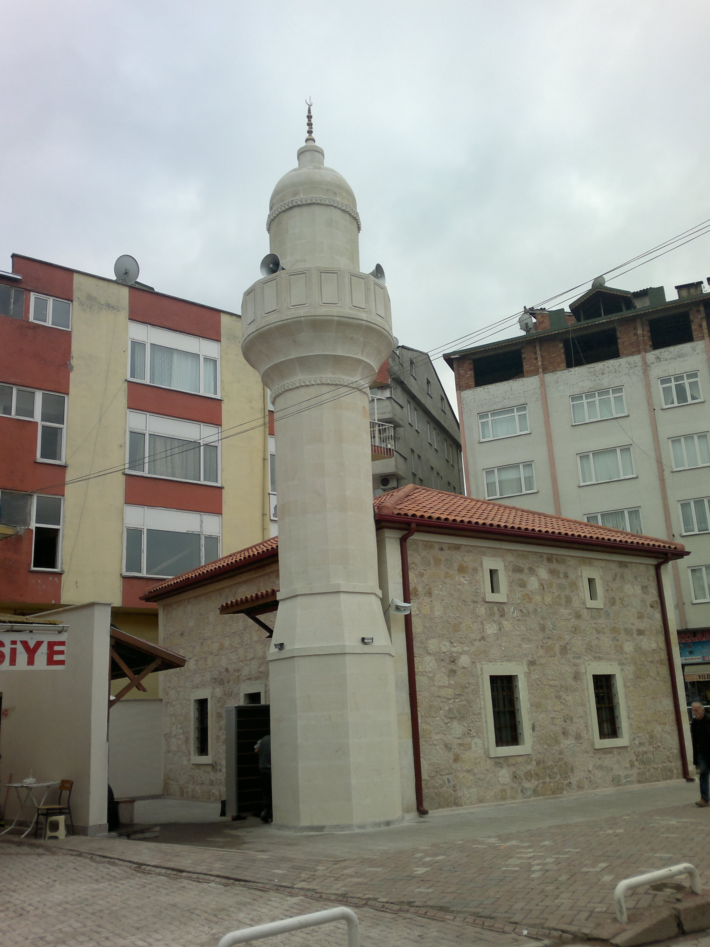 Ordu-Fatsa H acı Hulusi Baba Camii (1899 yılı yapımı)